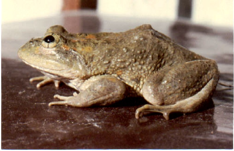 Paa sternosignata